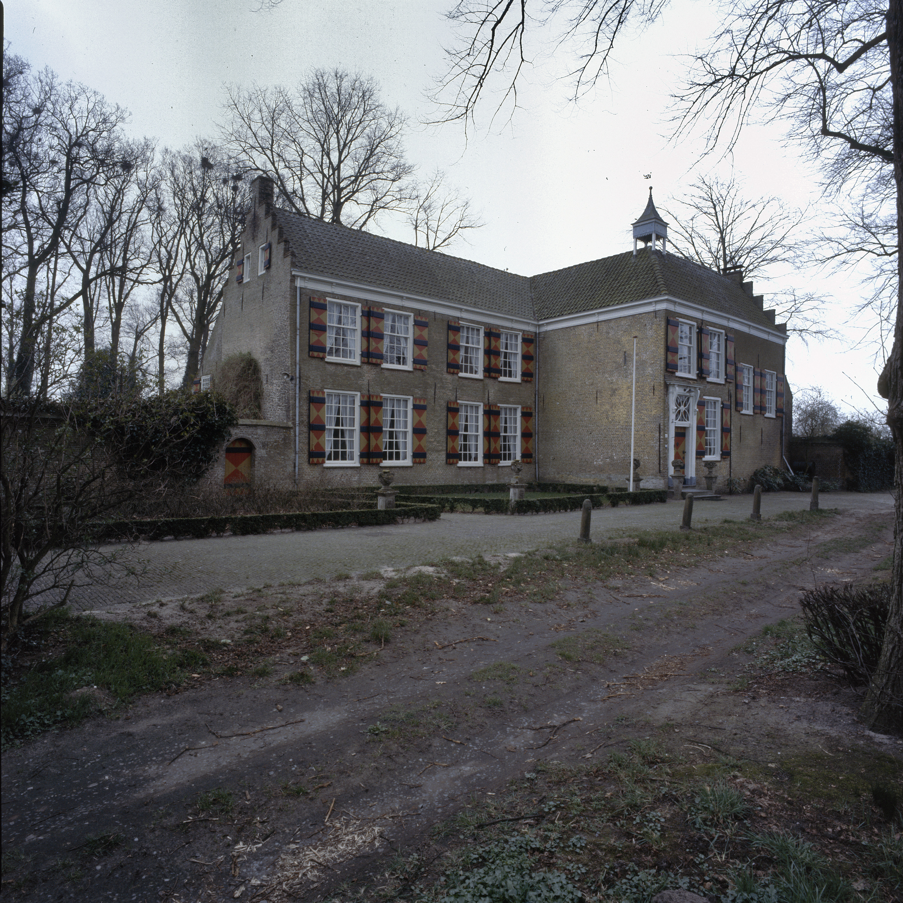 Huis Zuidewijn: Overzicht voorgevel en linker zijgevel buitenhuis, edelmanswoning (opmerking: Gefotografeerd voor Monumenten In Nederland Noord-Brabant)